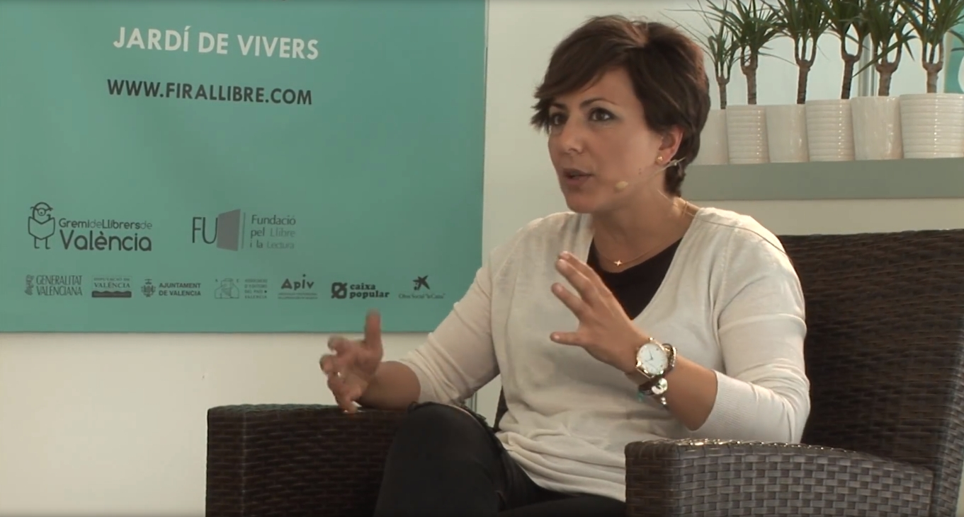 Sonsoles Ónega - Nosotras que lo quisimos tanto